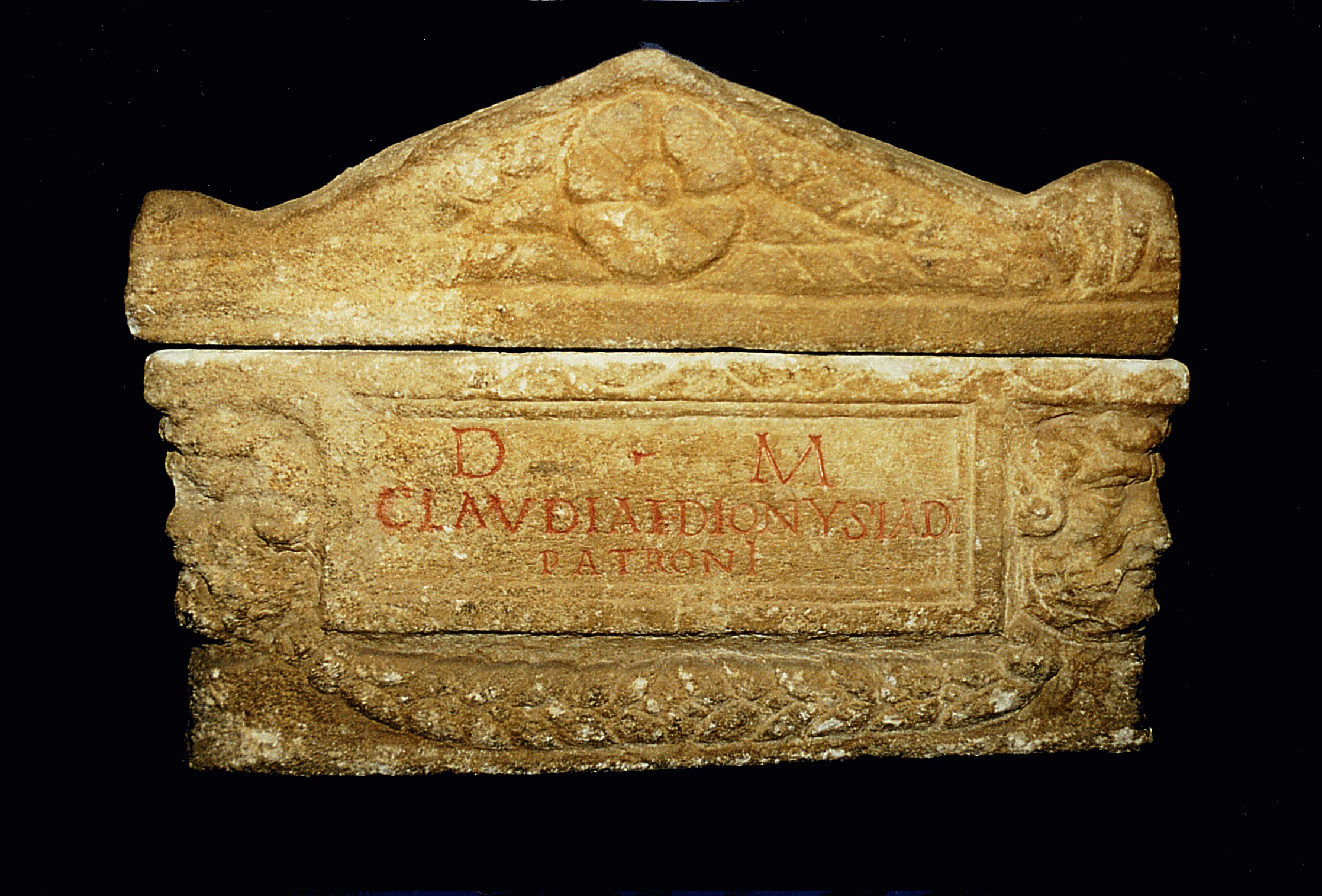 Eine Aschenurne mit zwei Windgöttern links und rechts. Die Urne wurde am Hauptplatz in Schwechat um 1900 gefunden.